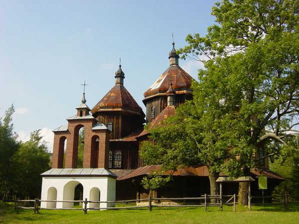 Bystre (powiat bieszczadzki)- cerkiew